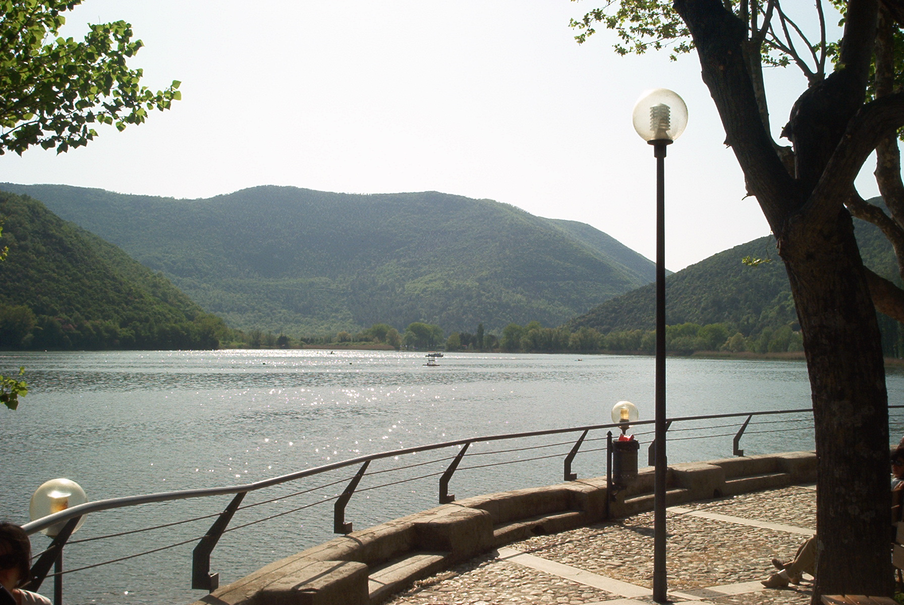 Veduta del lago di Piediluco, nel comune di Terni